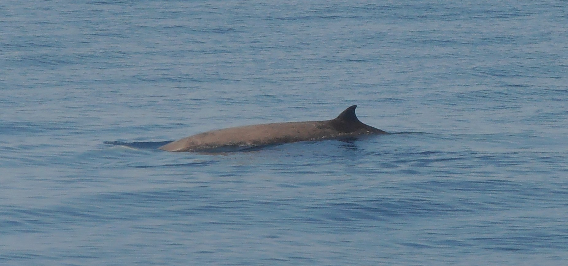 Maschio adulto di Ziphius cavirostris al largo della Liguria